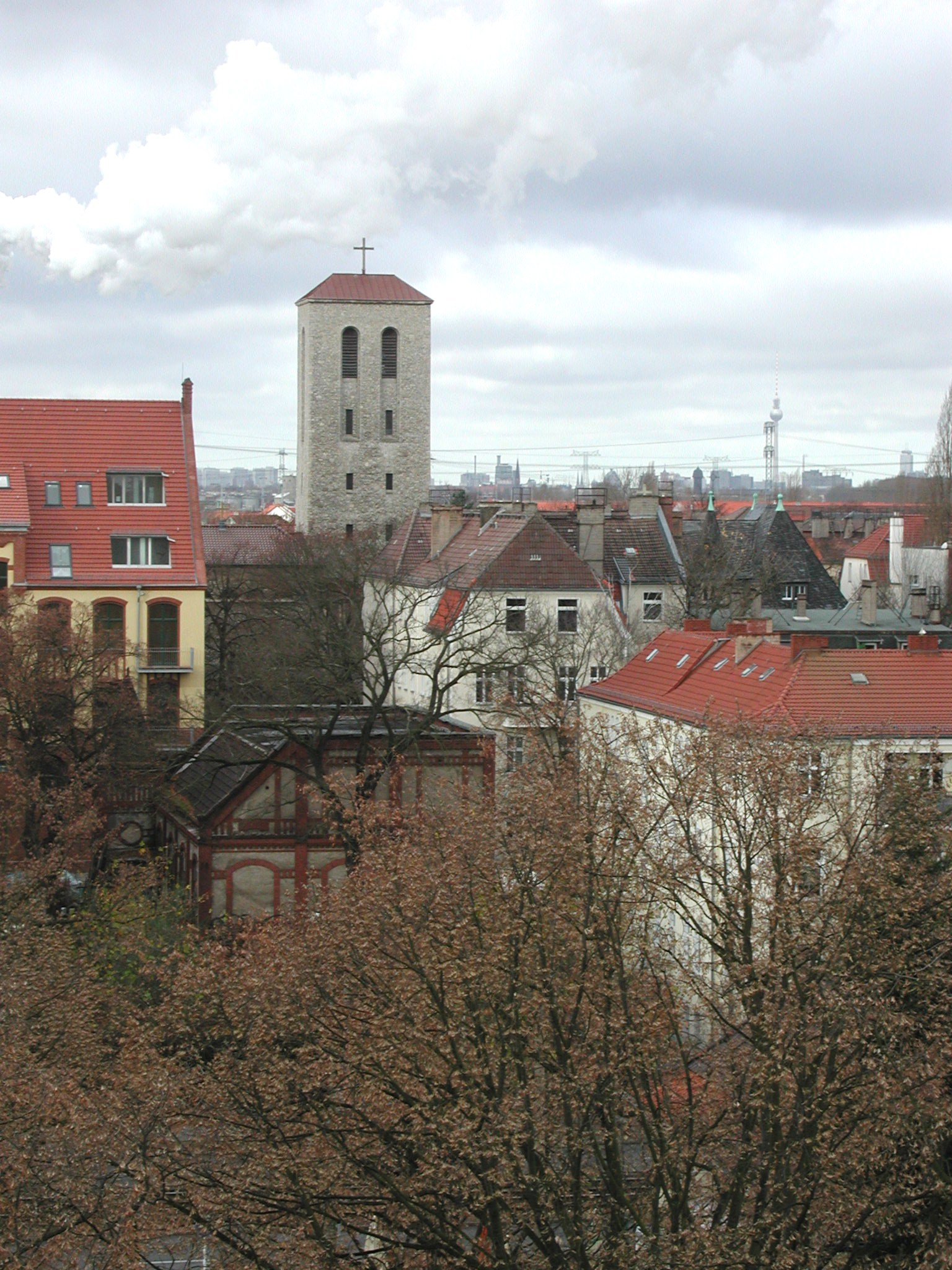 St. Marienkirche in Berlin-Karlshorst